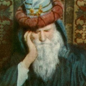 Ritaglio del volto di Omar Khayyam.